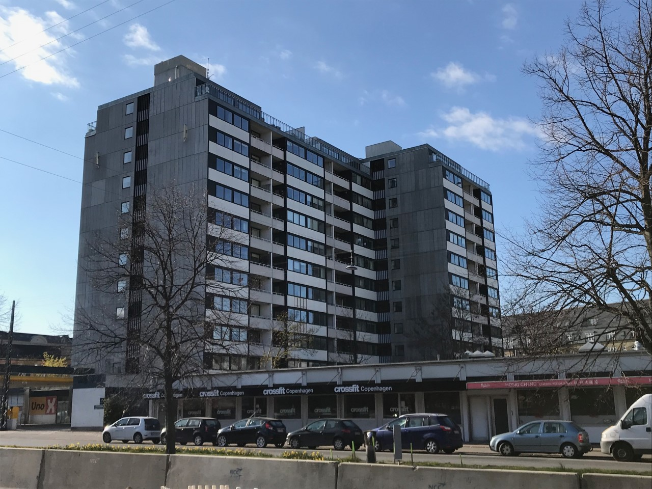 Østerpark fotograferet fra sydøst, fra Jagtvej. April 2019